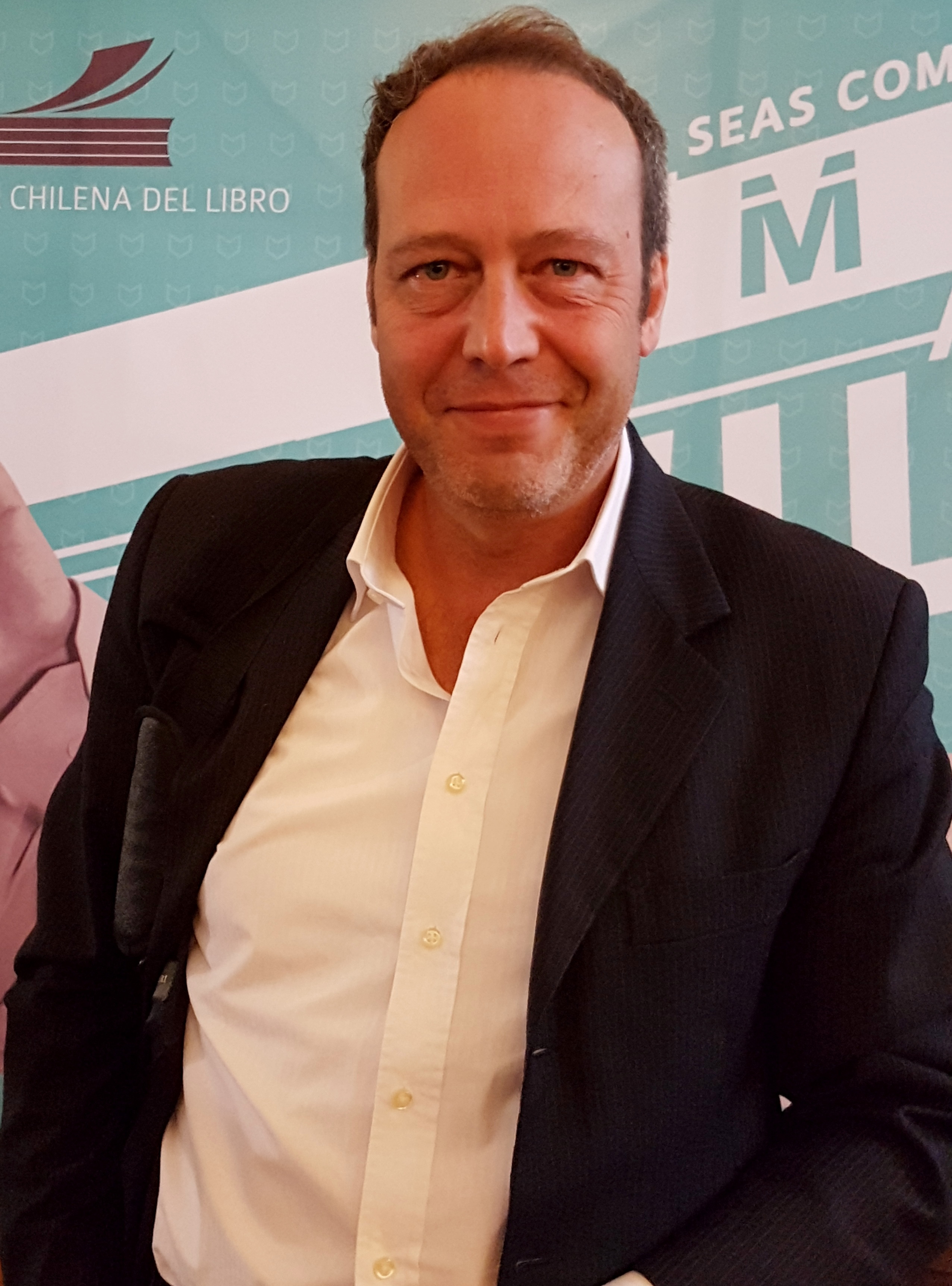 El poeta italiano Claudio Pozzani en la Feria Internacional del Libro de Santiago 2017.